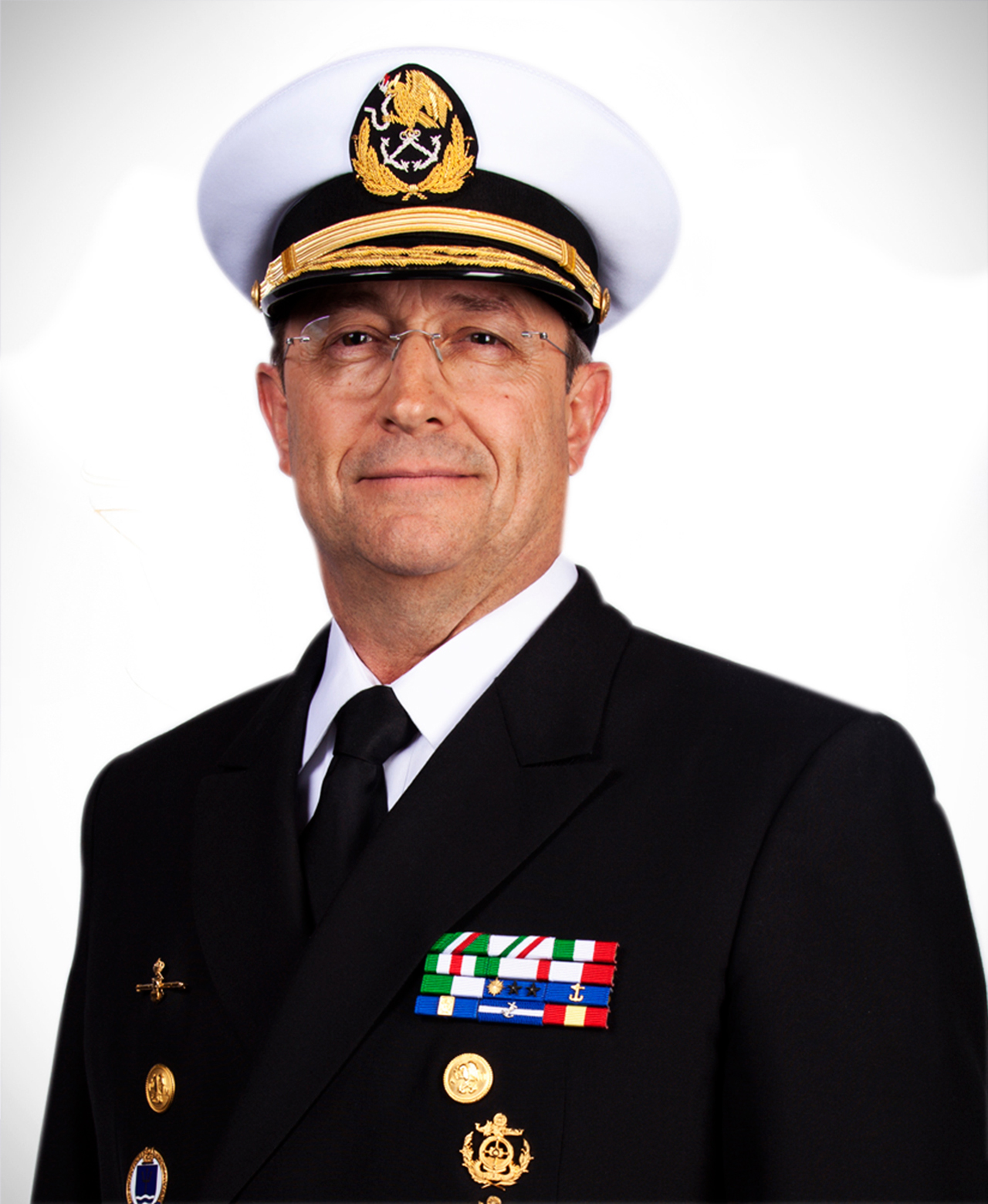 Almirante Vidal Francisco Soberón Sanz. Secretario de Marina de México. Gobierno del presidente Enrique Peña Nieto.